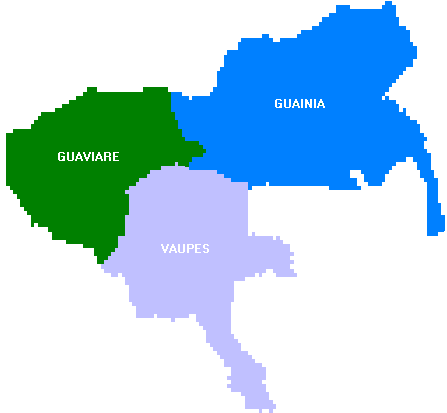 Los tres Departamento que formaron el Gran Vaupés